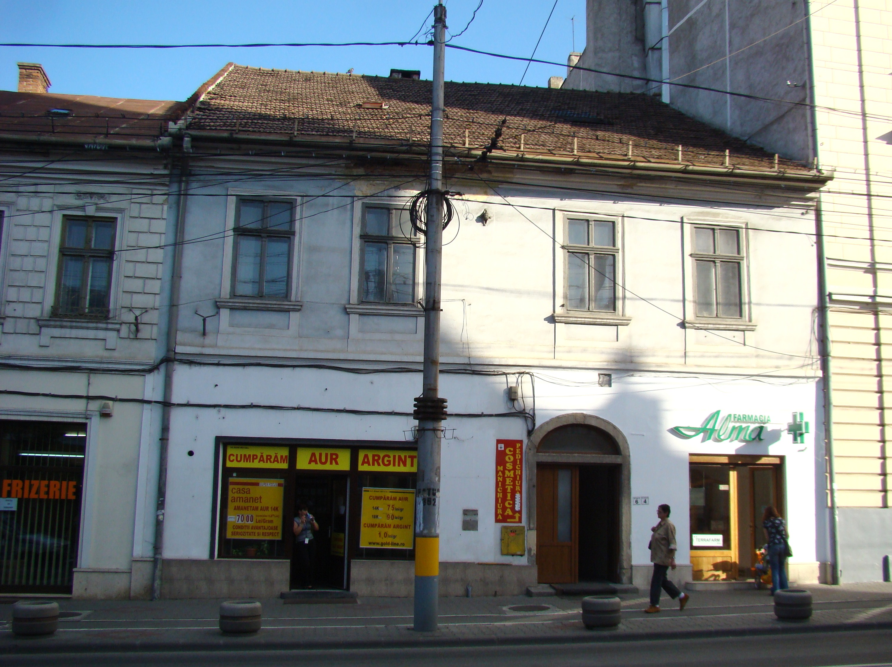 Casă, monument istoric, Bd.21 Decembrie 1989, nr.4